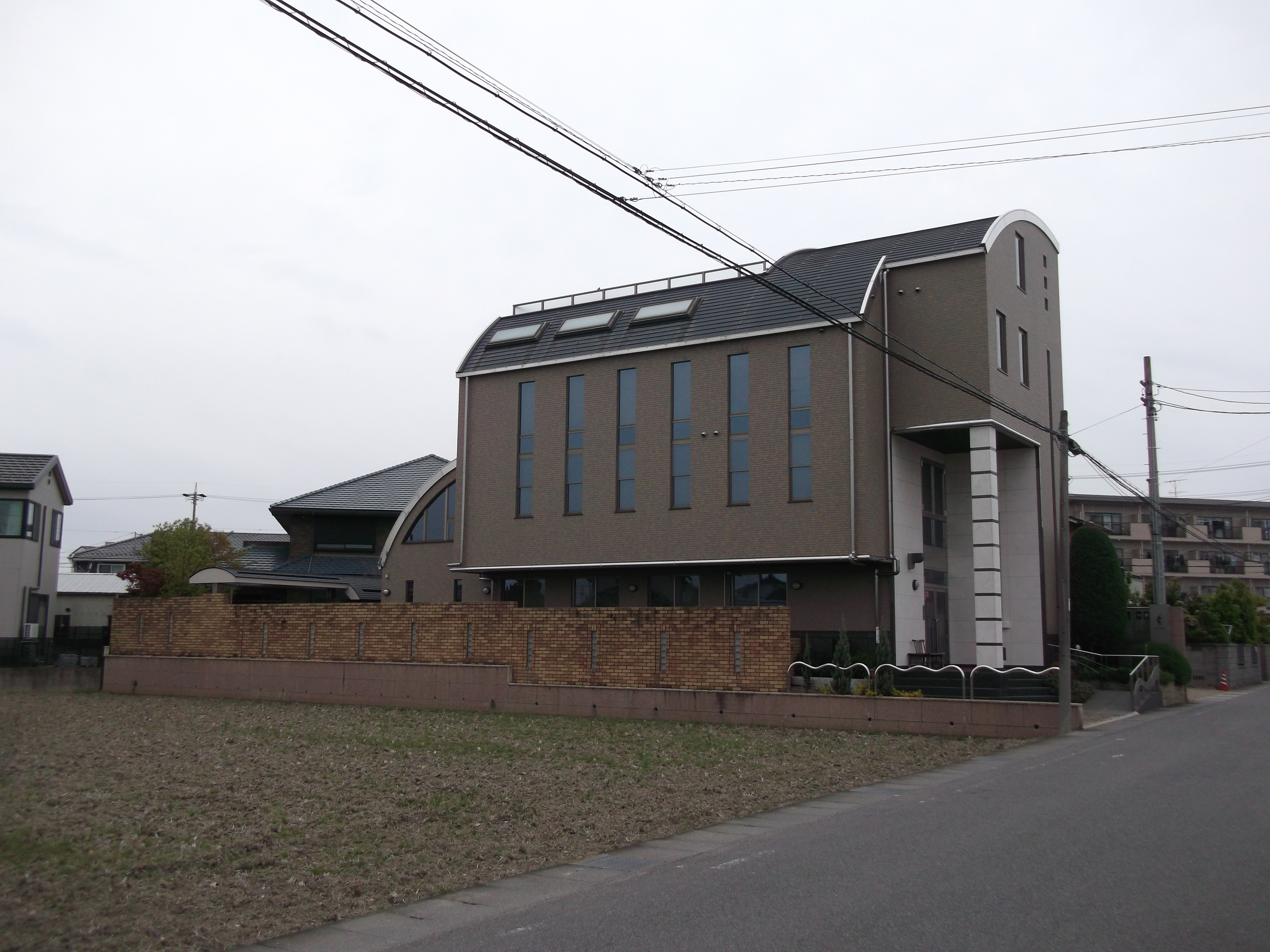 愛知県西春日井郡豊山町のイチロー展示ルーム「アイ・ファイン」を南西側公道より撮影